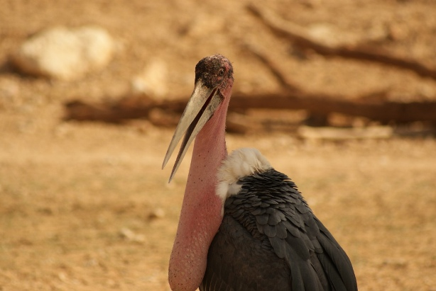 Leptoptilos crumeniferus